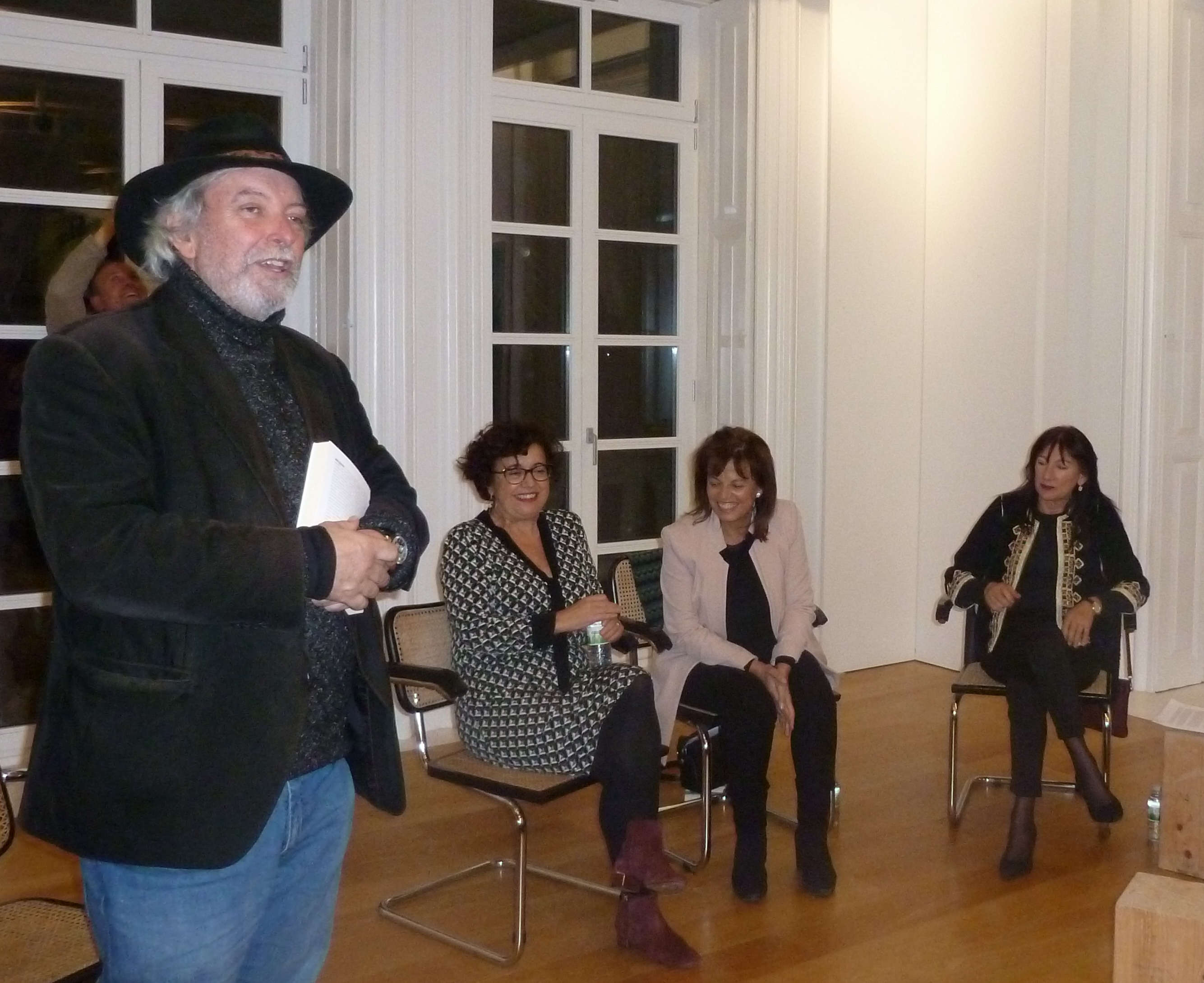 Presentación de am@me de Chis Oliveira e Amada Traba no Espazo Nemonon de Pontevedra o 03/01/2018. Con Lola Varela e Antón Sobral